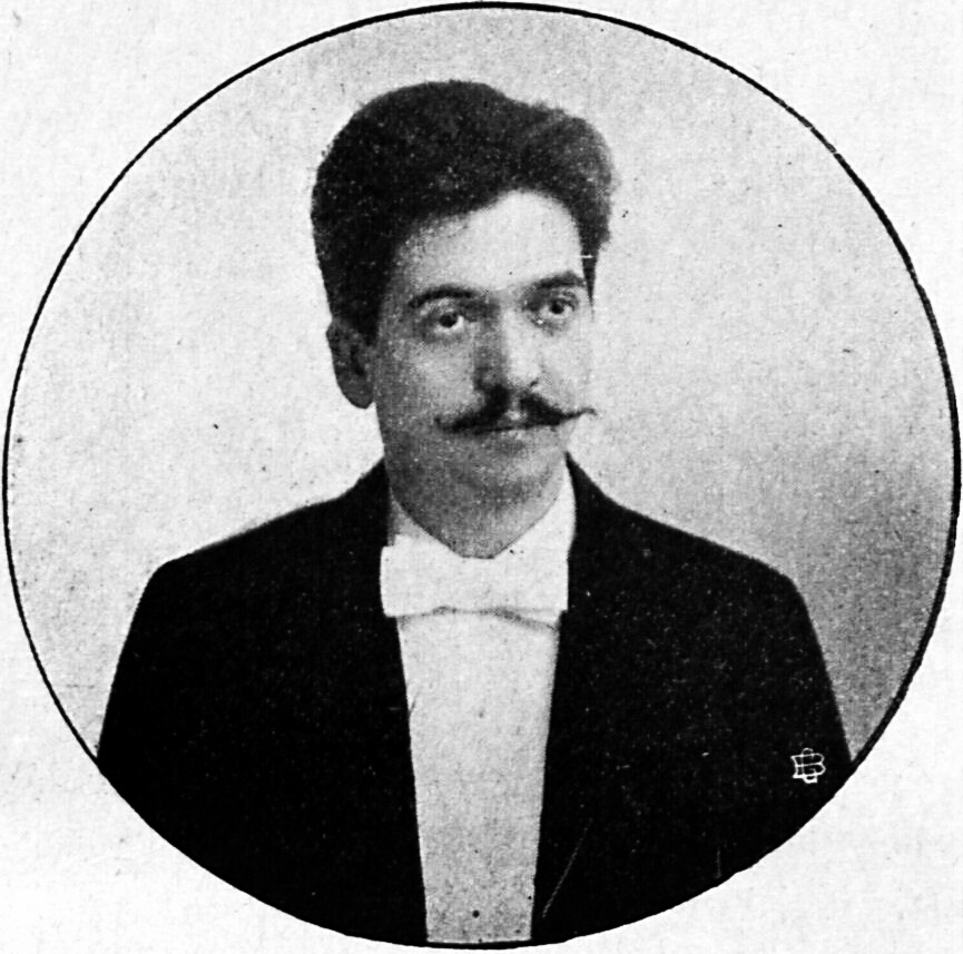 Ugo Afferni, Kapellmeister des Orchesters des Vereins der Musikfreunde von Herbst 1897-1905.